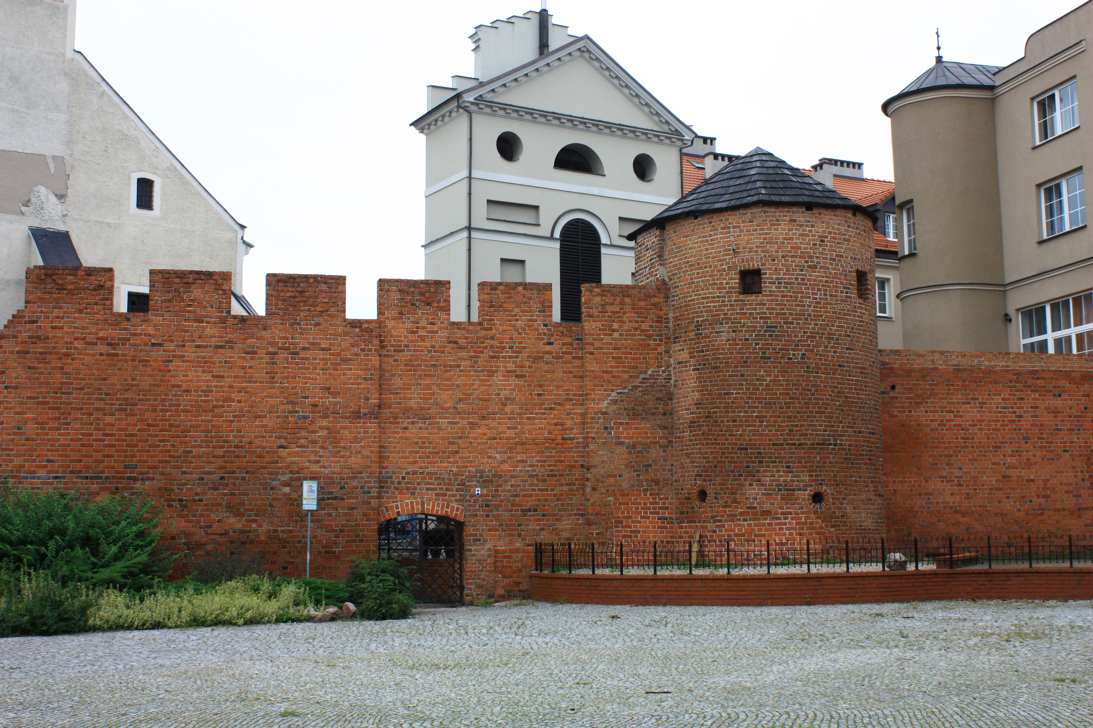 Kalisz, pozostałości murów miejskich z basztą Dorotka